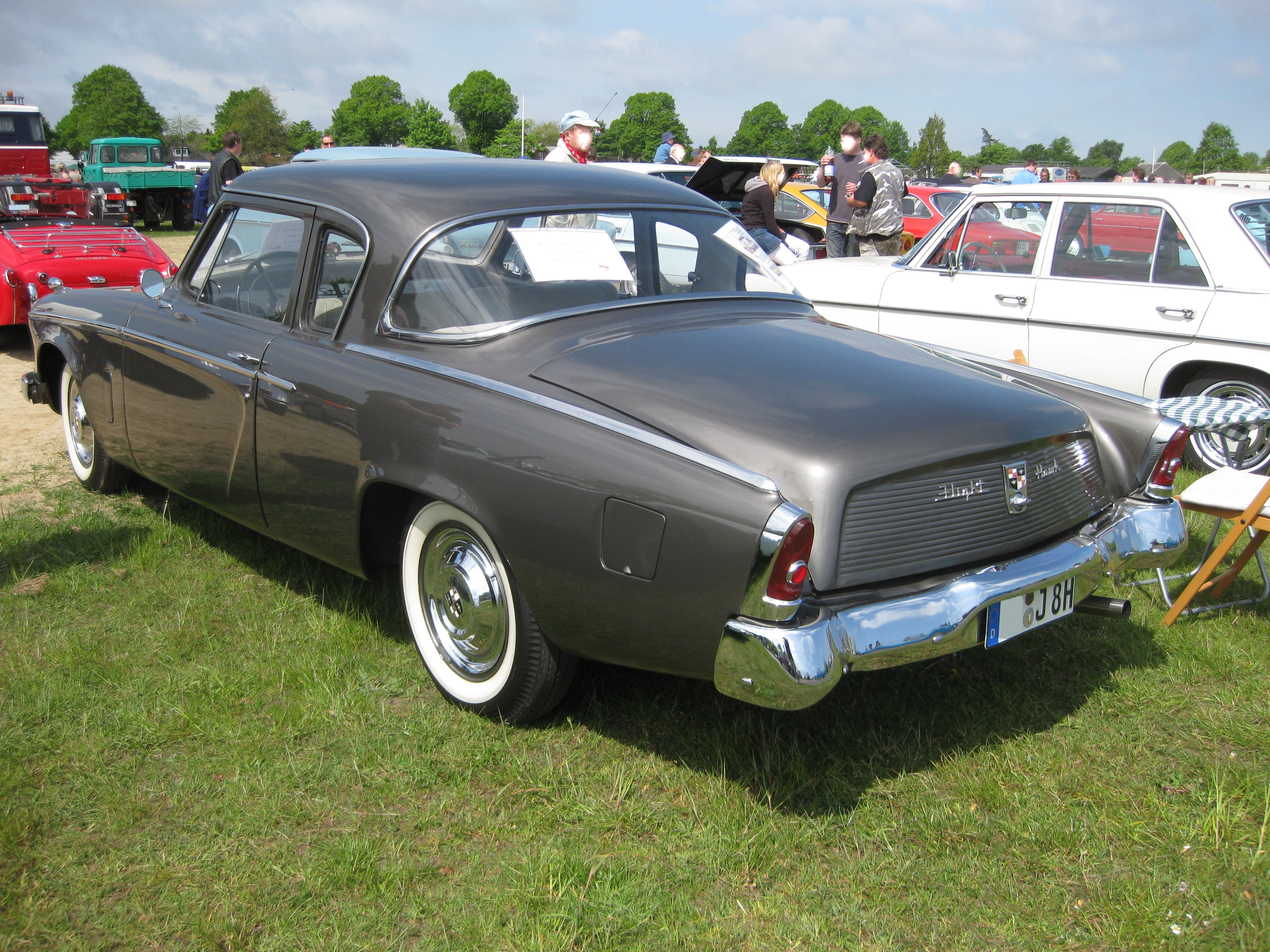 Studebaker Flight Hawk Heckansicht